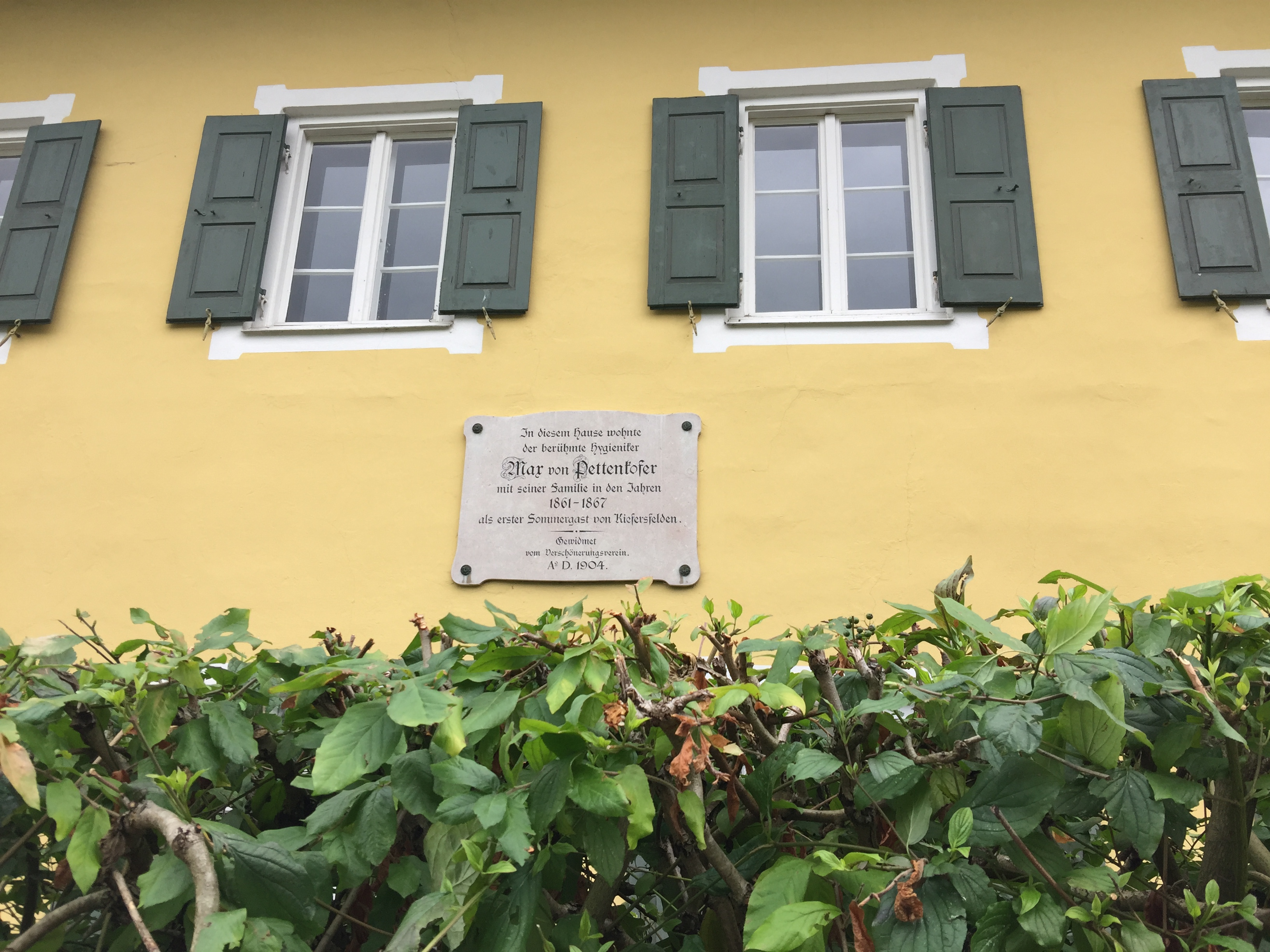 Tafel auf Wohnhaus in der König-Otto-Straße im oberbayerischen Kiefersfelden mit Hinweis auf Urlaubsaufenthalt von Max von Pettenkofer (erster Sommergast in den 1860er-Jahren).